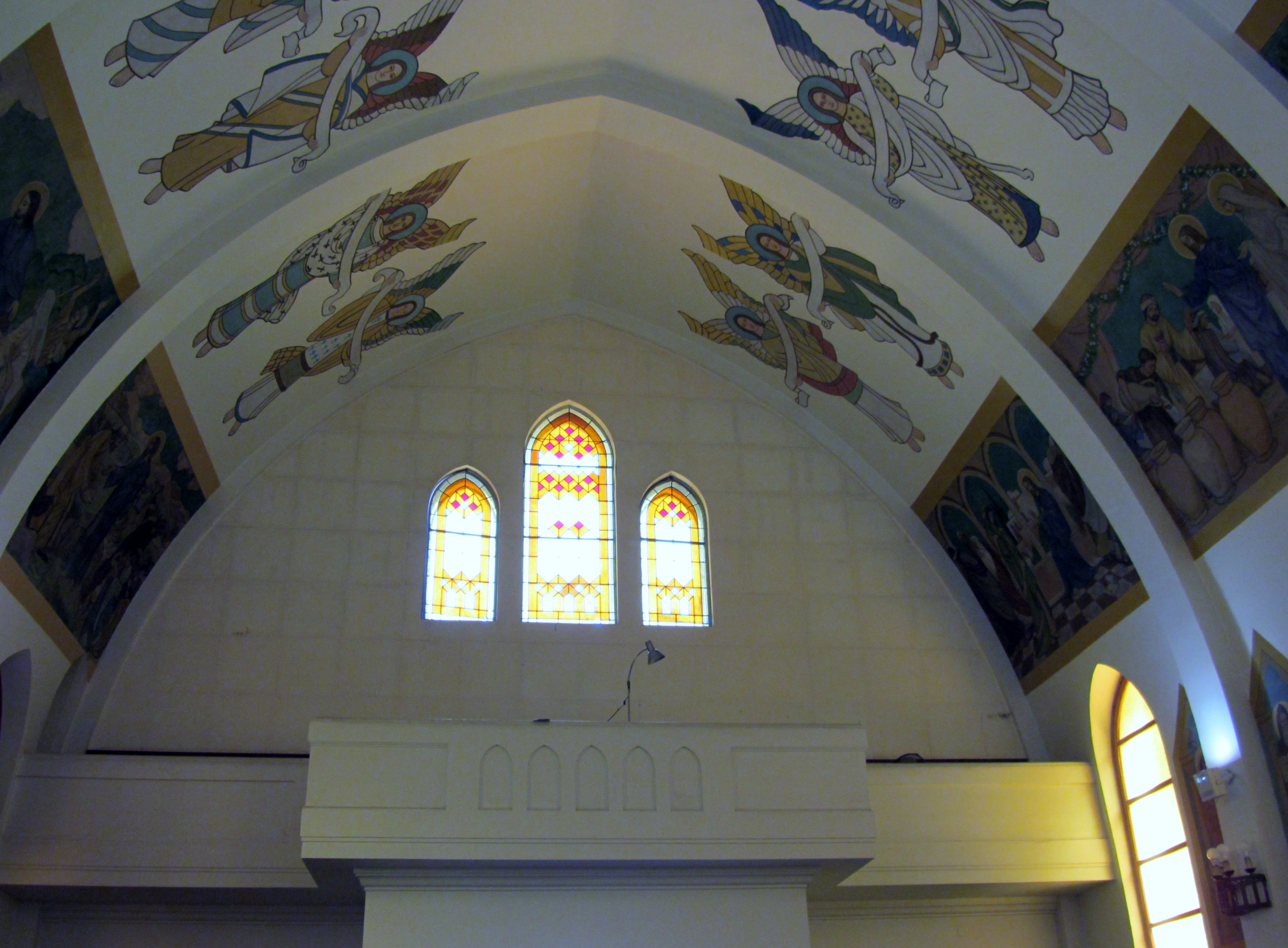 Iglesia de Nuestra Señora de los Ángeles en el barrio El Golf